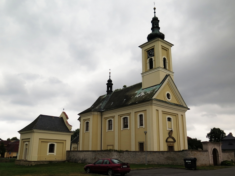 Kostel svatého Jana Křtitele, Žichlínek.